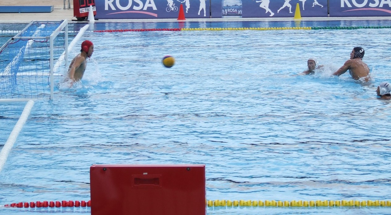 Извођење петерца на утакмици Јапан - САД на Универзијади у Београду 2009.